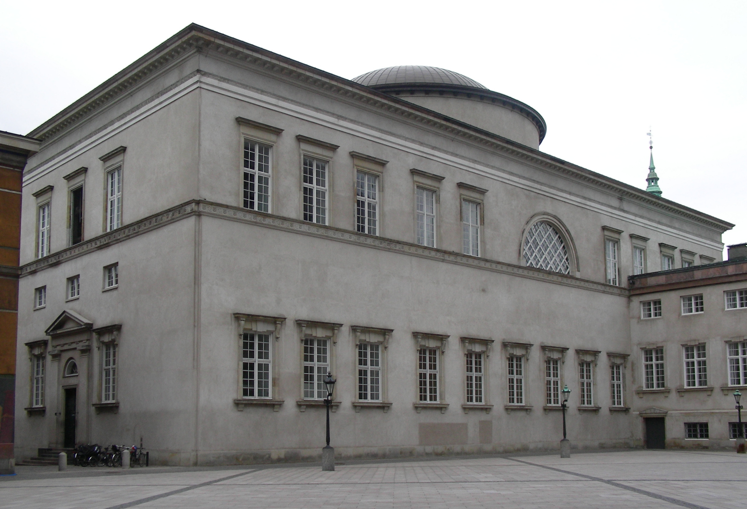 Christiansborg Slotskirke, Copenhagen, Denmark.